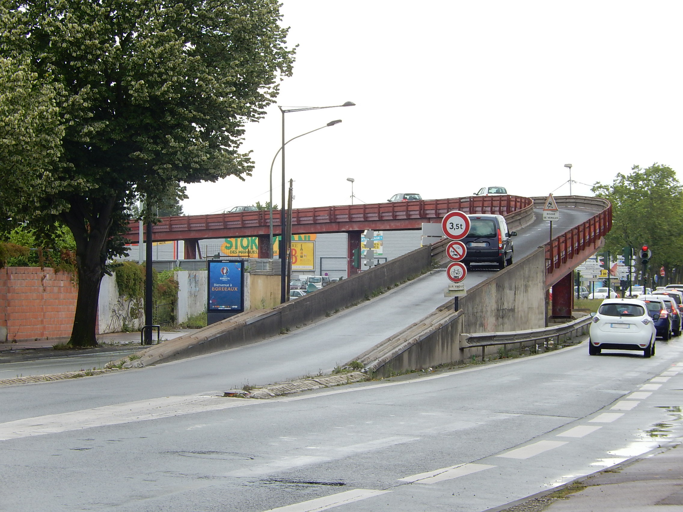 L'entrée de l'autopont à sens unique survolant la Place Latule, à Bordeaux. Installé en 1972, il permet aux automobilistes en provenance de la place Ravezies de rejoindre la rocade, plus au Nord, en évitant les feux tricolores de la place Latule.